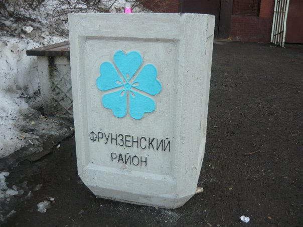 trash